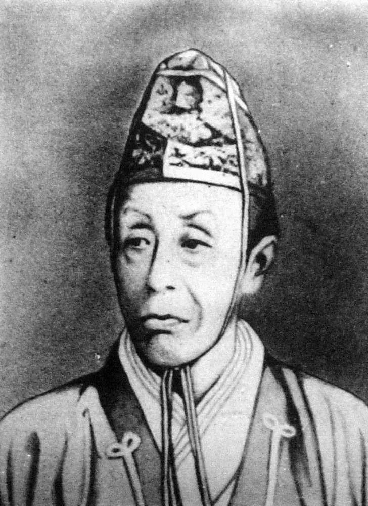 a Japanese man 板倉勝静 (Katsukiyo Itakura)